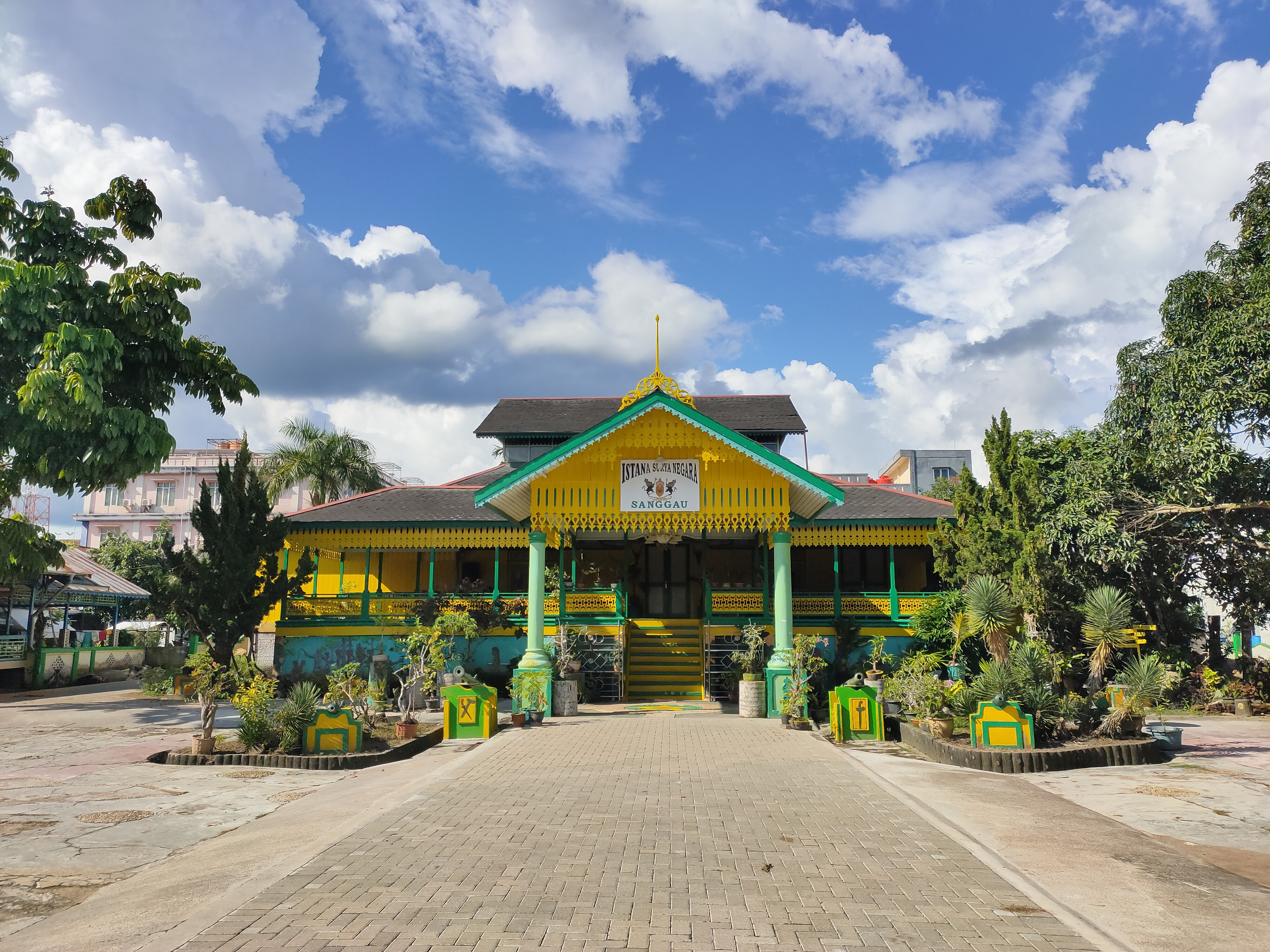 Istana Surya Negara Kerajaan Sanggau di Kabupaten Sanggau, Kalimantan Barat